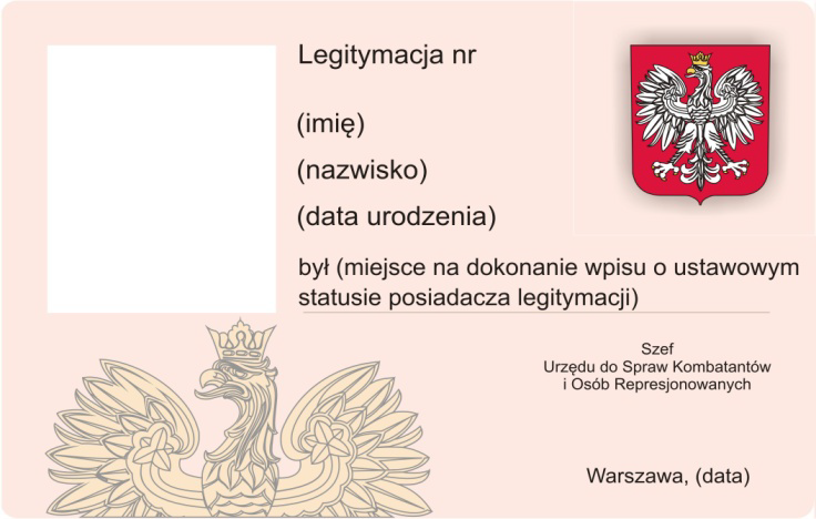 Projekt rewersu legitymacji